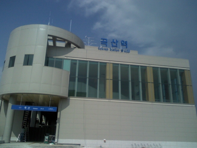 京義線電鉄 谷山駅